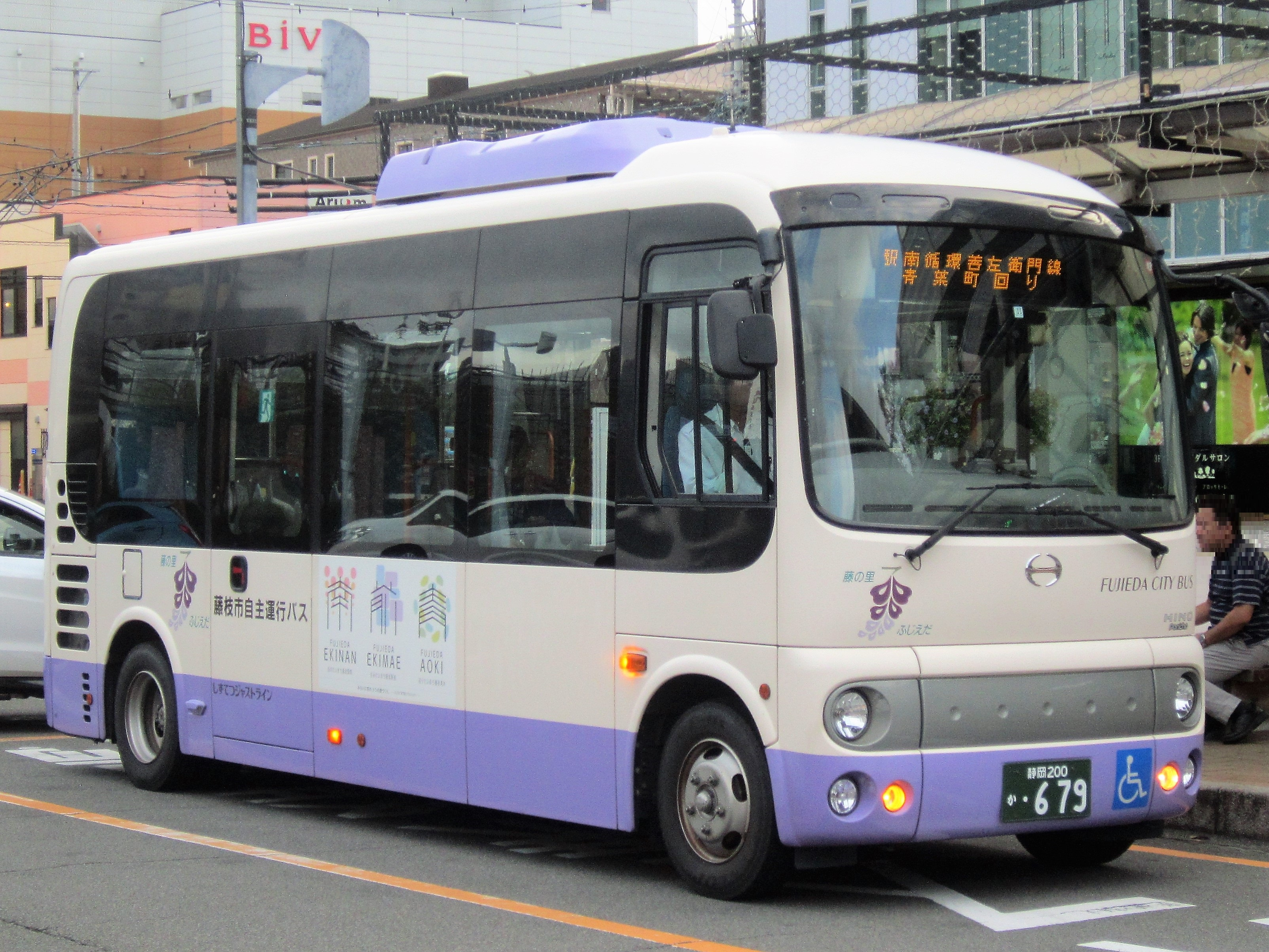 藤枝駅前に停車中の藤枝市自主運行バス